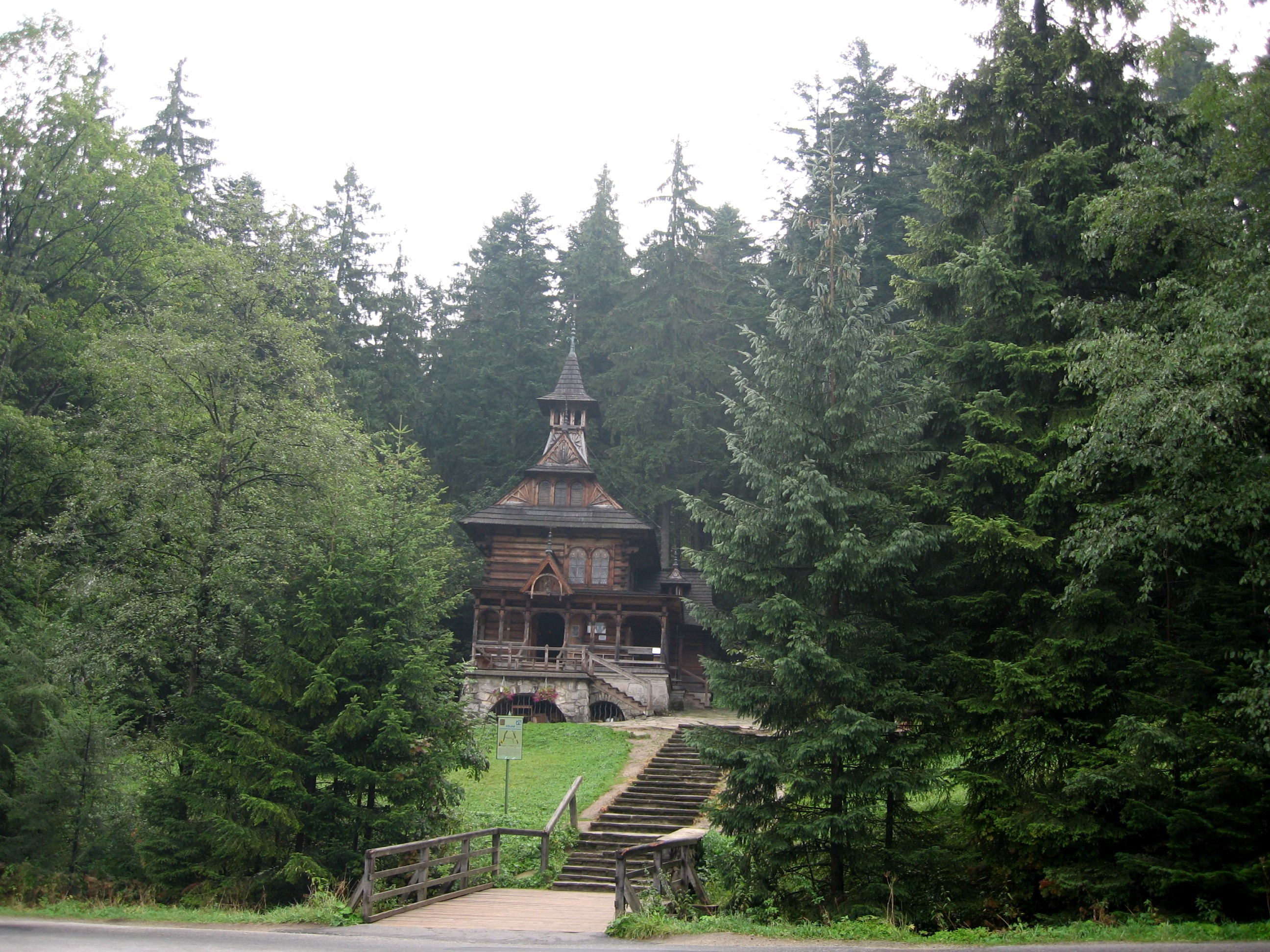 Zakopane-Jaszczurowka.Capilla del Santisimo Corazon de Jesus.Estilo zakopianski. Construida en madera a principios del siglo XX